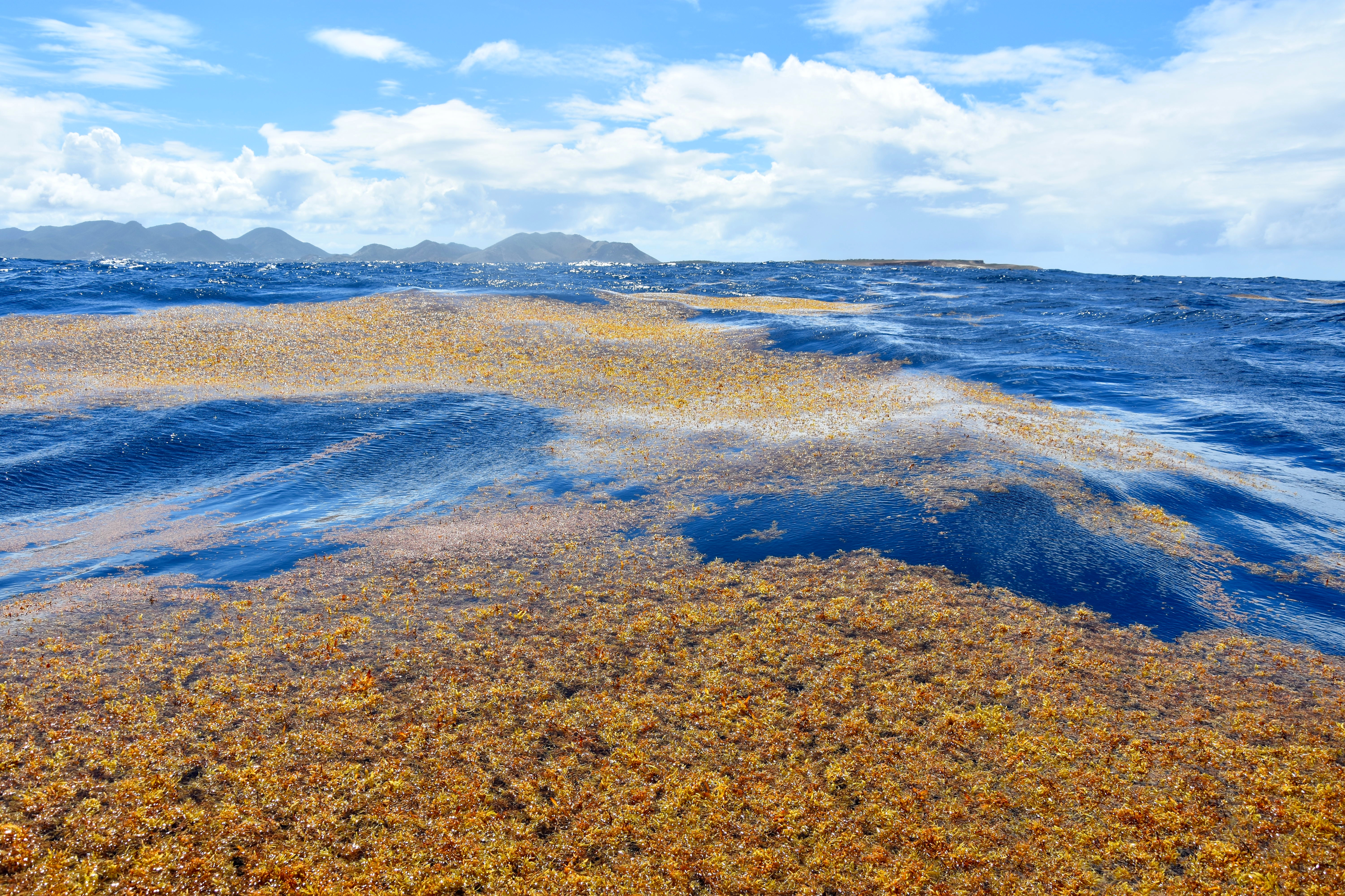 Avril 2018. Ces sargasses arrivent en masse depuis le Sud et envahissent la Réserve Naturelle Nationale de Saint Martin aux Antilles. L'Océan se rééquilibre : il est certain que cette prolifération de sargasses est un moyen de défense contre les mauvais traitements infligés par l'homme aux écosystèmes marins, côtiers et littoraux. C'est un avertissement clair pour limiter voire abolir les actions anthropiques néfastes pour les organismes marins.